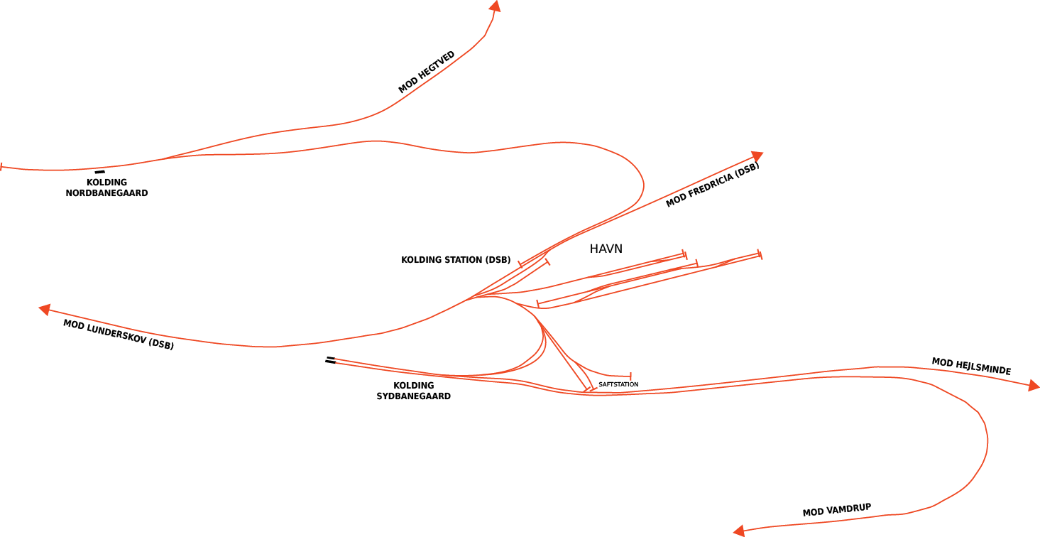 Banelinjer for Kolding by i ca. 1910